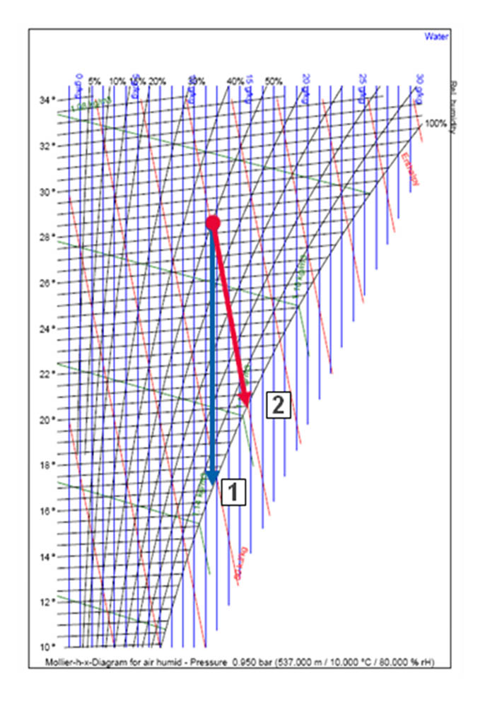 Nattebolkoeling ( lijn 2 in Mollierdiagram) Nattebolkoeling betreft een adiabatisch proces, waarbij de mate van koeling afhankelijk is van de zogenaamde natteboltemperatuur. Deze is afhankelijk van de temperatuur en de relatieve vochtigheid (% RV) van de aangezogen lucht. Dauwpuntkoeling (lijn 1 in Mollierdagram) Dauwpuntkoeling betreft een diabatisch proces. Een dauwpuntkoeler is een indirecte verdampingskoeler met een tegenstroom- of kruisstroom-warmtewisselaar, die de primaire lucht koelt en de proceslucht bevochtigt en afvoert naar de omgeving. De mate van koeling is hier afhankelijk van het dauwpunt. Deze is op zijn beurt afhankelijk van het absolute vochtgehalte (gr./kg) van de te koelen lucht. Omdat het dauwpunt onder de natteboltemperatuur ligt is bij gelijke omstandigheden, de uitgaande luchttemperatuur bij dauwpuntkoeling 3 tot 4 °C lager dan bij nattebolkoeling. Het bijzonder kenmerk van dauwpuntkoeling is dat bij een overdag stijgende omgevingstemperatuur onder invloed van de zon en bij een gelijk blijvend absoluut vochtgehalte, de koelcapaciteit stijgt, bij een gelijkblijvend energiegebruik.